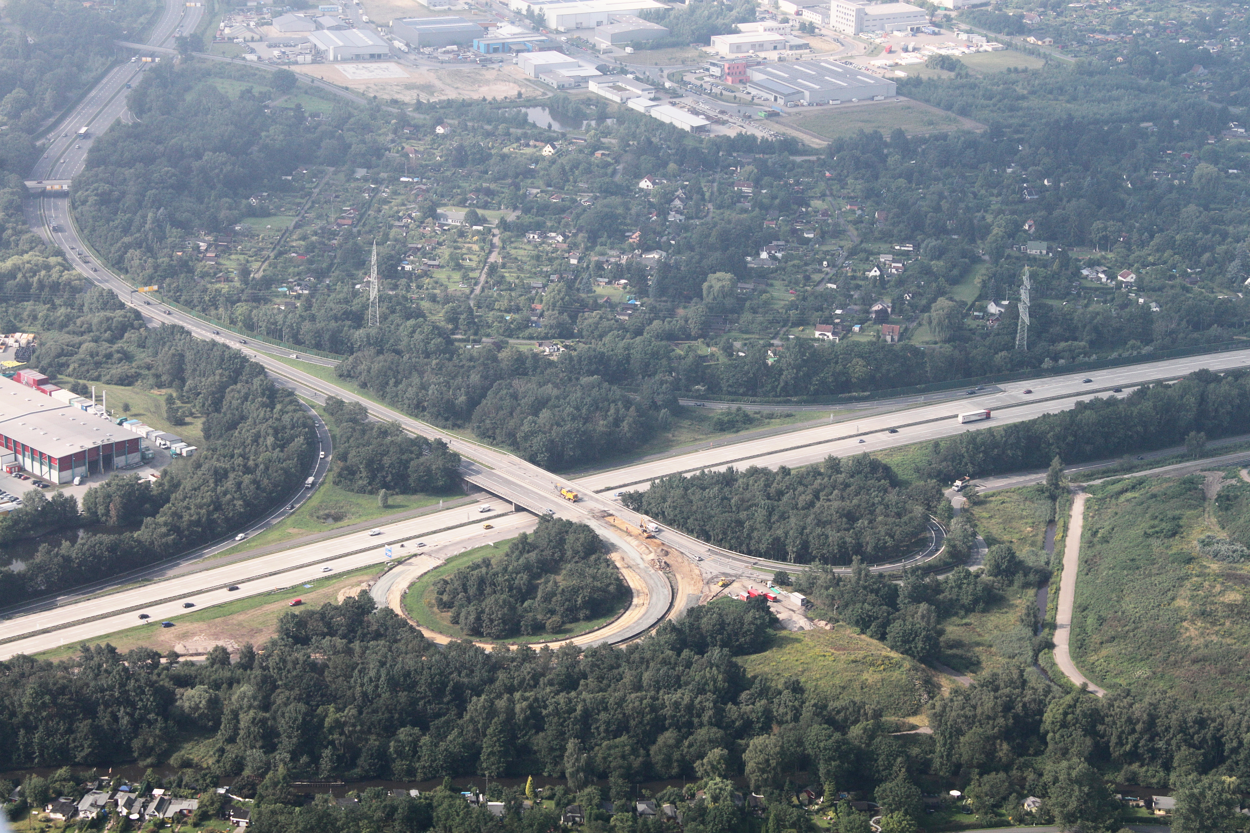 Fotoflug Bremen; Flughöhe 500 m; Uni Bremen bis Abfahrt Überseehäfen